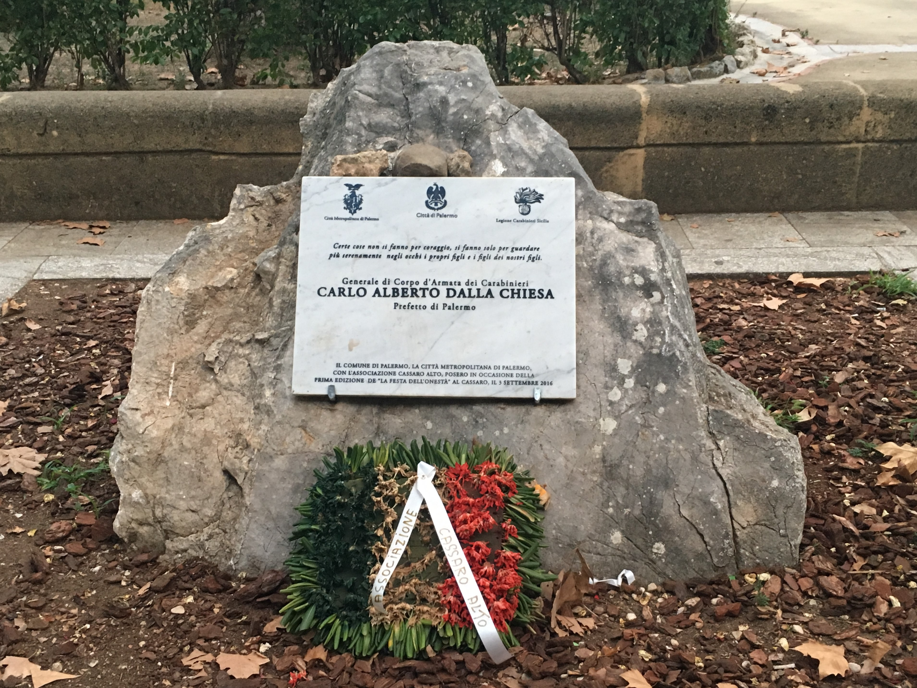 Targa commemorativa a dalla Chiesa a Villa Bonanno a Palermo, inaugurata per il 34° anniversario della sua morte.